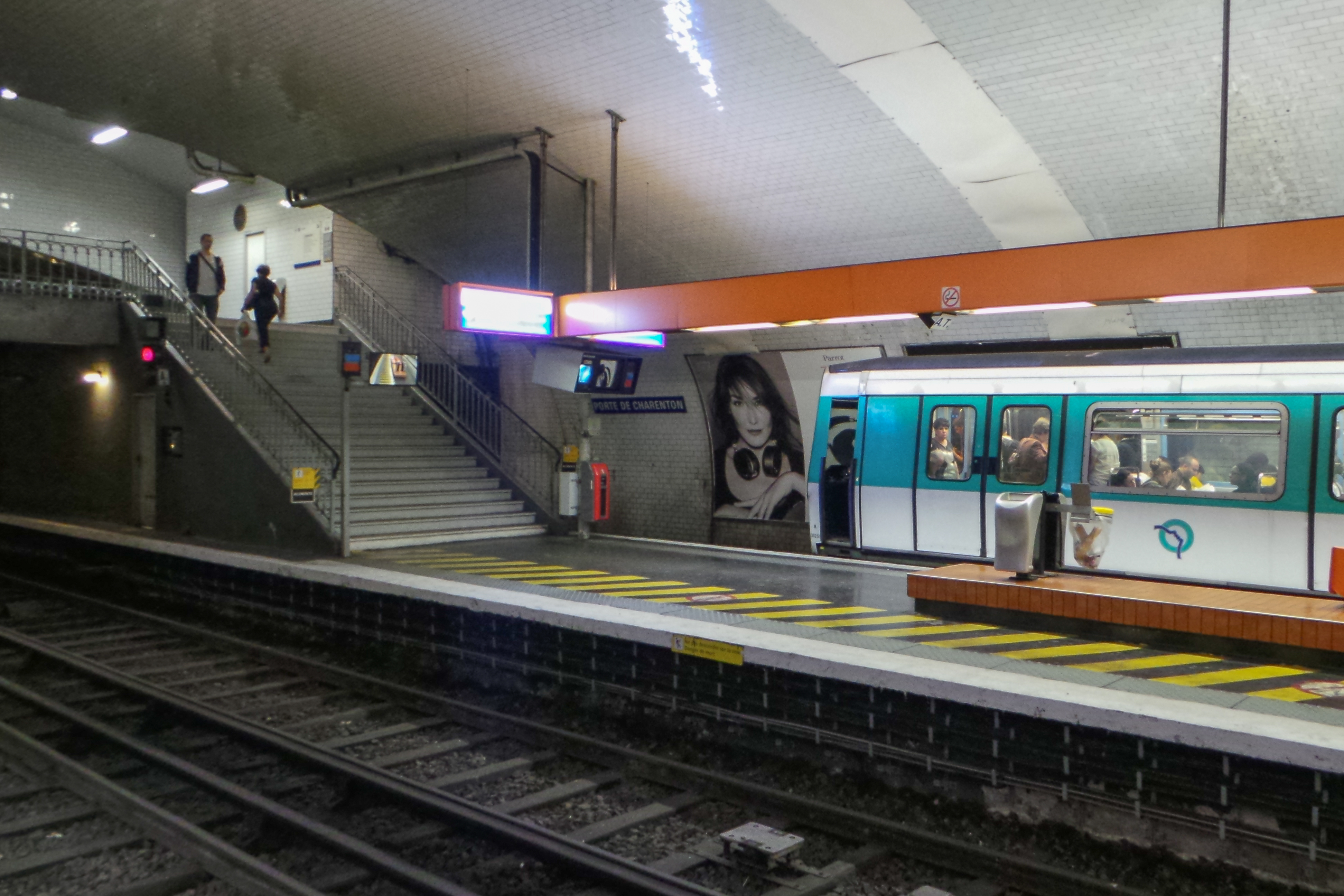 Station de métro Porte de Charenton, ligne 8 du métro de Paris - Paris, France